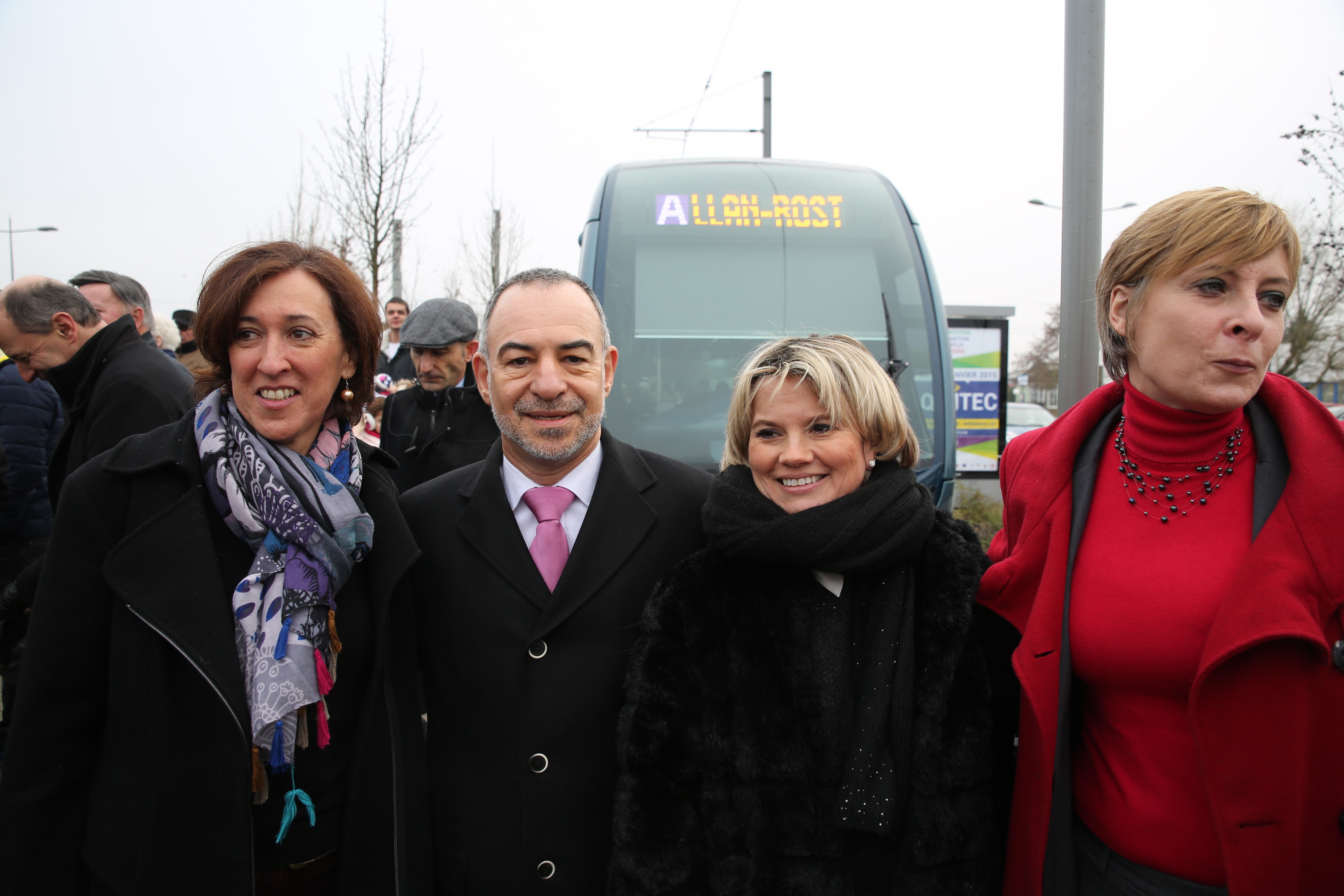 Personnalités politiques participant à l'inauguration du prolongement de la ligne A du tramway de Bordeaux jusqu'au Haillan. On identifie sur cette photo, de gauche à droite : Mme Carole Guère, conseillère départementale (Mérignac I) élue en 2015 ; M Alain Charrier, conseiller départemental (Mérignac I) réélu en 2015 ; Mme Marie Récalde, députée de la 6e circonscription de Gironde ; Mme Andréa Kiss, maire du Haillan.